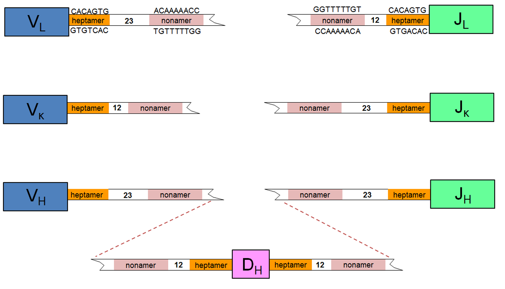 Схематически представлено т.н. правило рекомбинации 12/23 для сигнальных последовательности – recombination signal sequence (RSS)